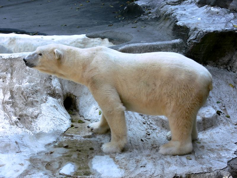 Белый (полярный) медведь